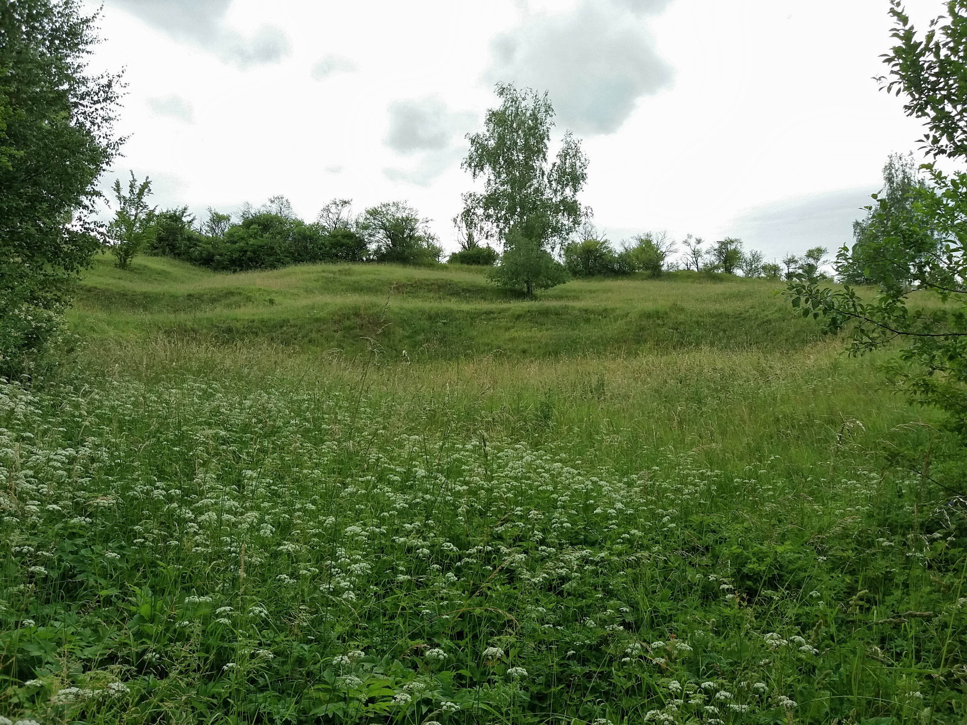 Přehon, přírodní památka v obci Chvalnov.